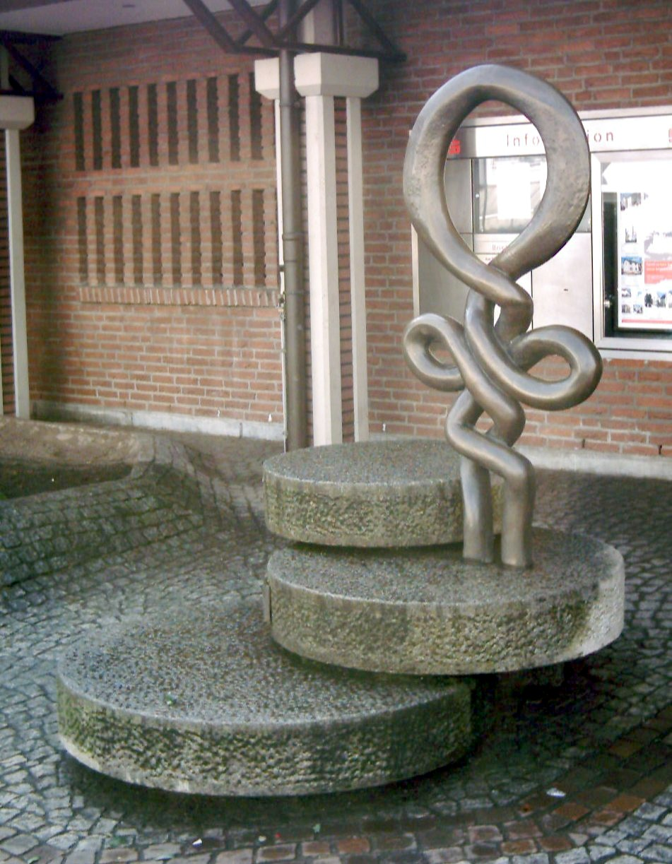 Nicht-Maßstabsgetreue Darstellung des Bieberer Amuletts vor der Sparkasse auf der Bieberer Hauotstraße. Das Werk wurde 1988 in Erinnerung an den 50. Jahrestag der Eingemeindung Biebers aufegestellt.